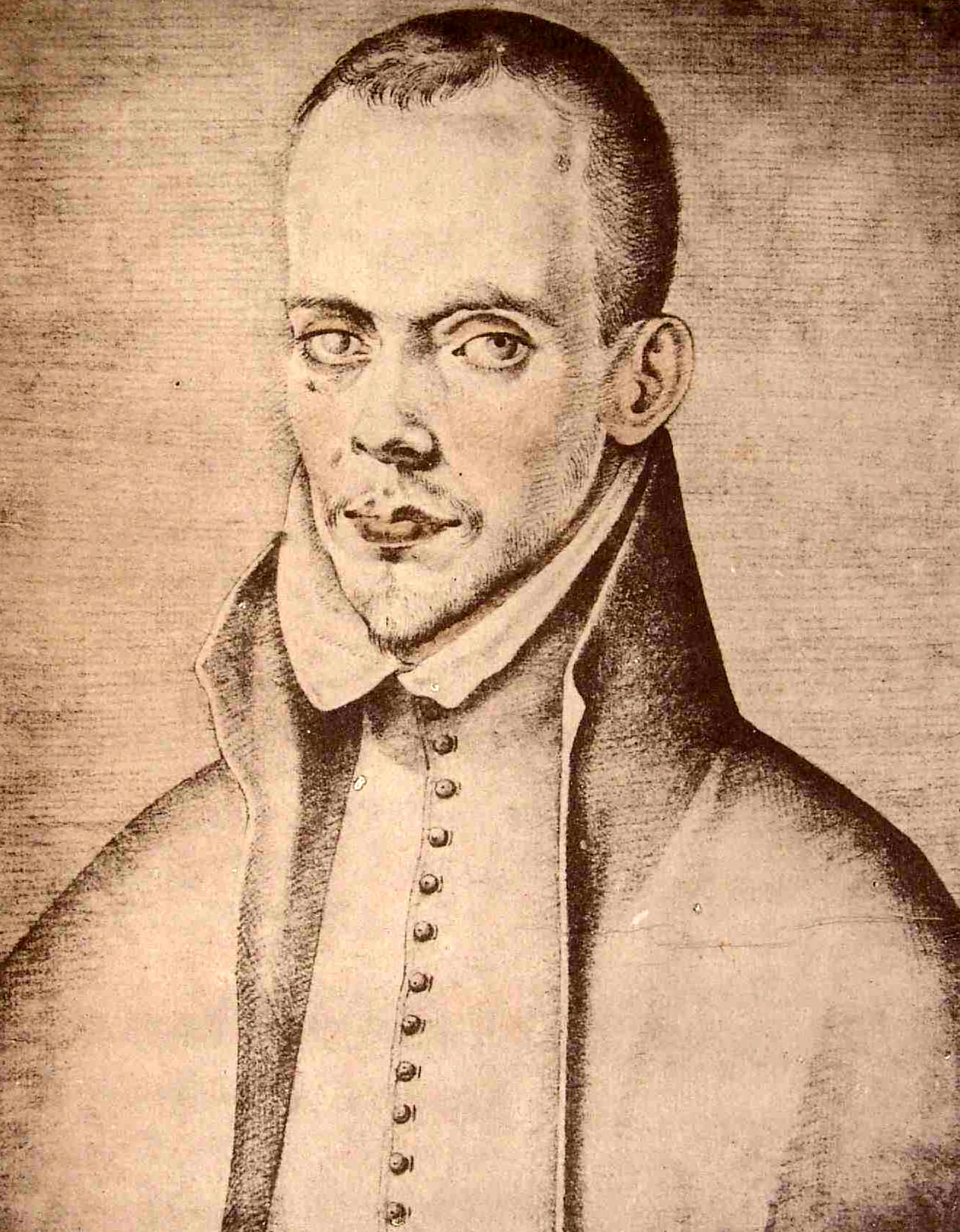 "Francisco Peraza". Puede acceder al libro completo en el siguiente enlace : Libro de descripción de verdaderos retratos de ilustres y memorables varones / escrito y dibujado por Francisco Pacheco. - Sevilla : Libreria Española y Extrangera de D. Rafael Tarasco, s.a